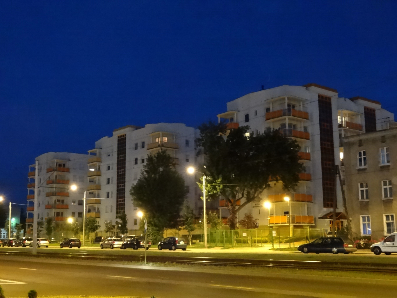 Osiedle 5 planet przy ul. Toruńskiej w Bydgoszczy